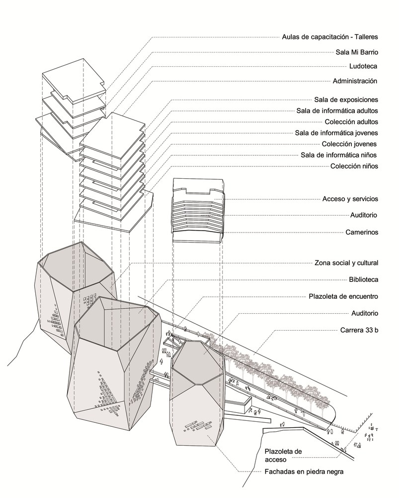 despiezo del parque biblioteca español ubicado en Medellin, Colombia